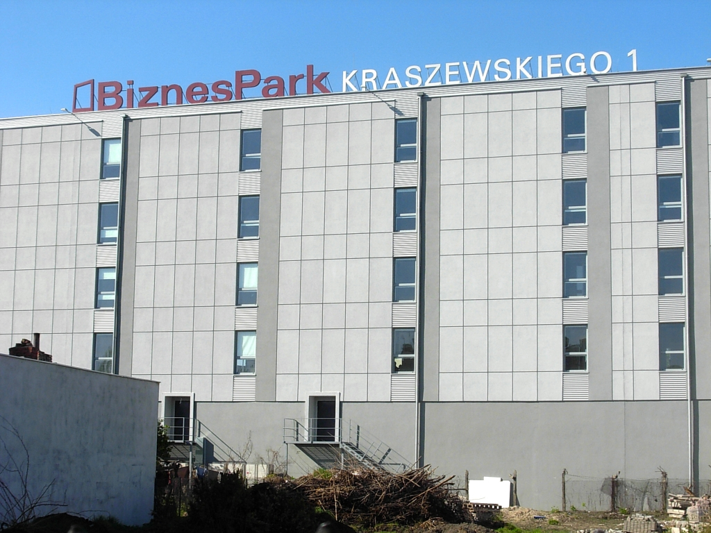 Biznes Park, Atos IT Services sp. z o.o. - kompleks przy ul. Kraszewskiego na os. Okole w Bydgoszczy